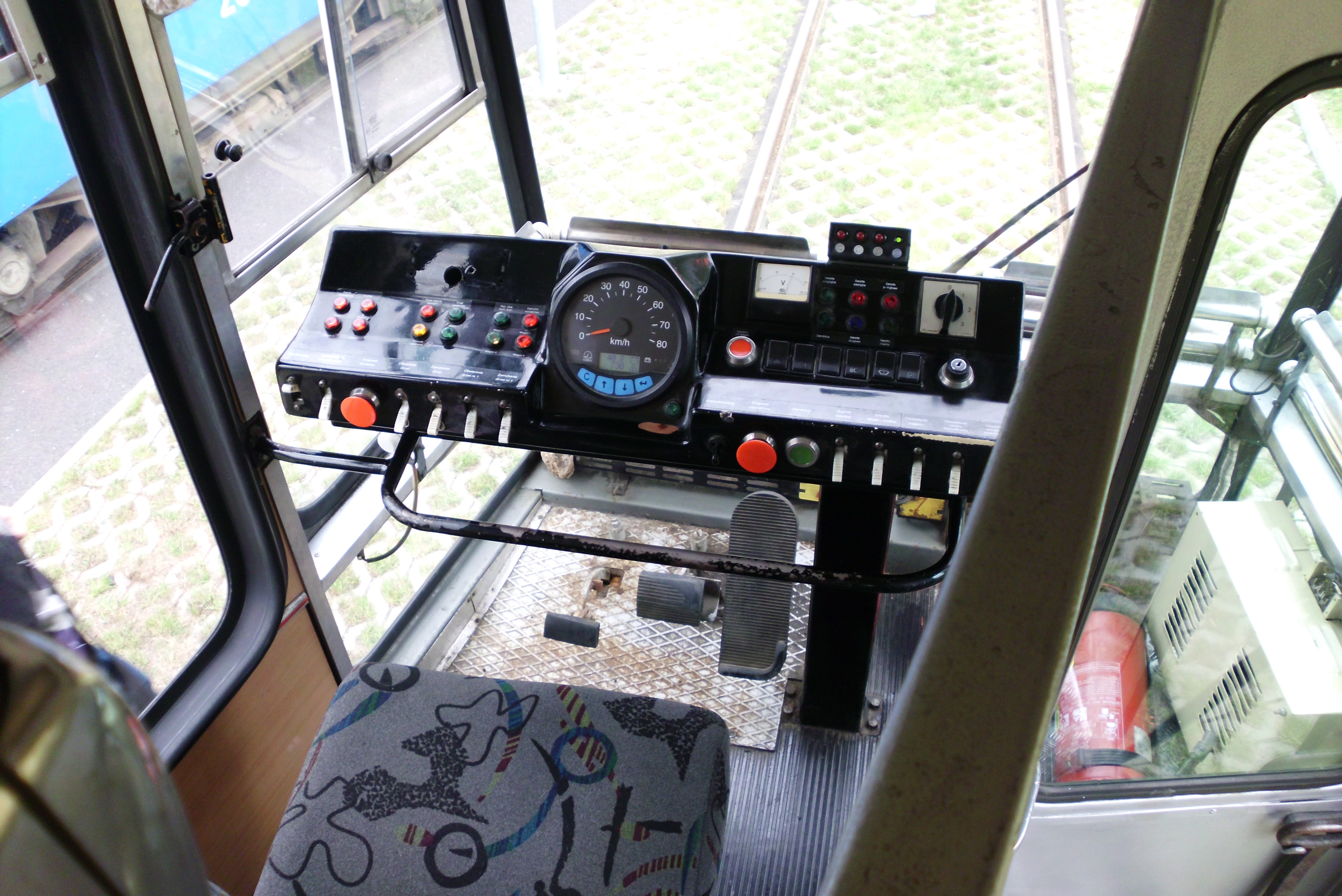 Konstal 105N - kabina motorniczego, Poznań